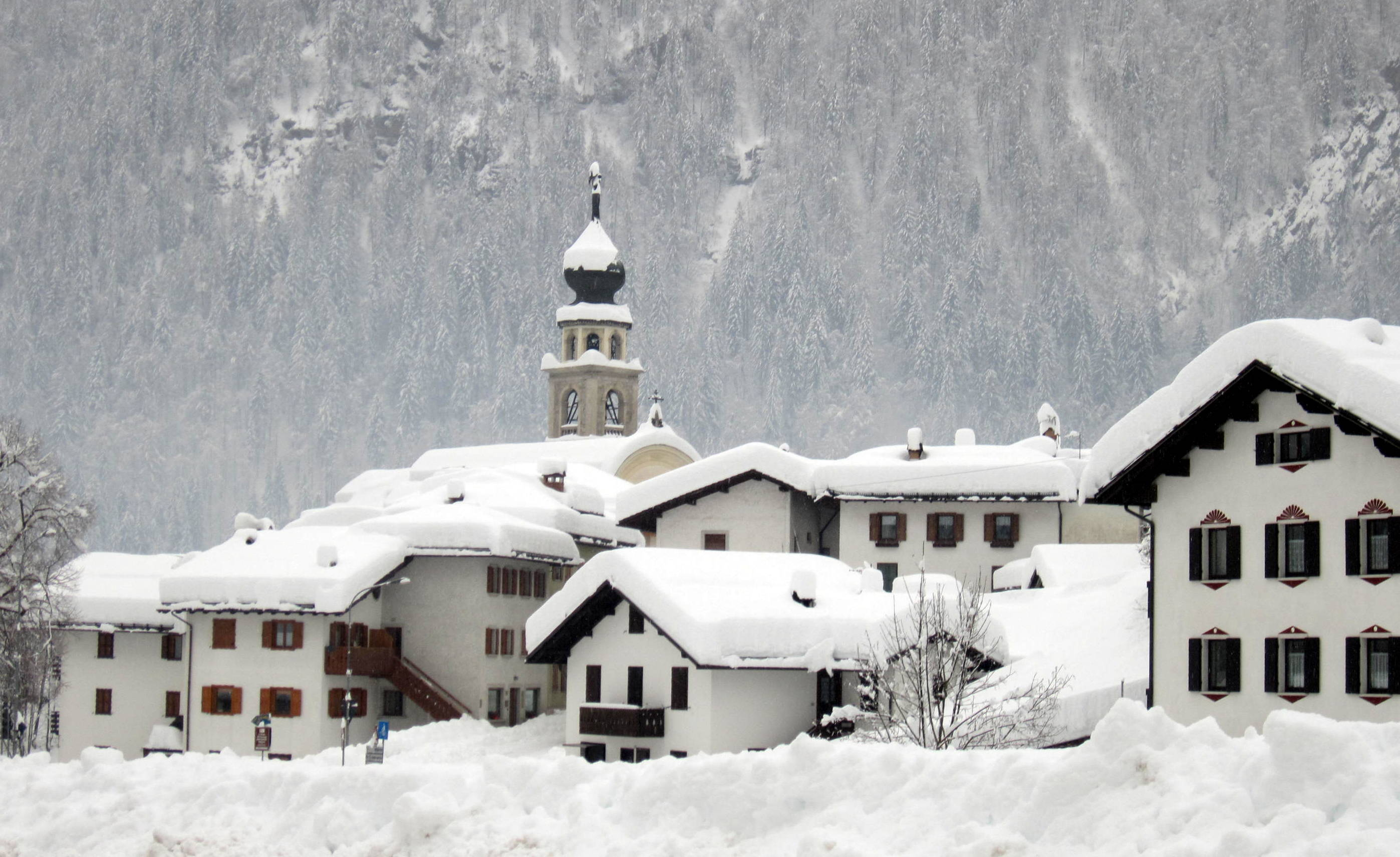 Veduta di Canale d'Agordo